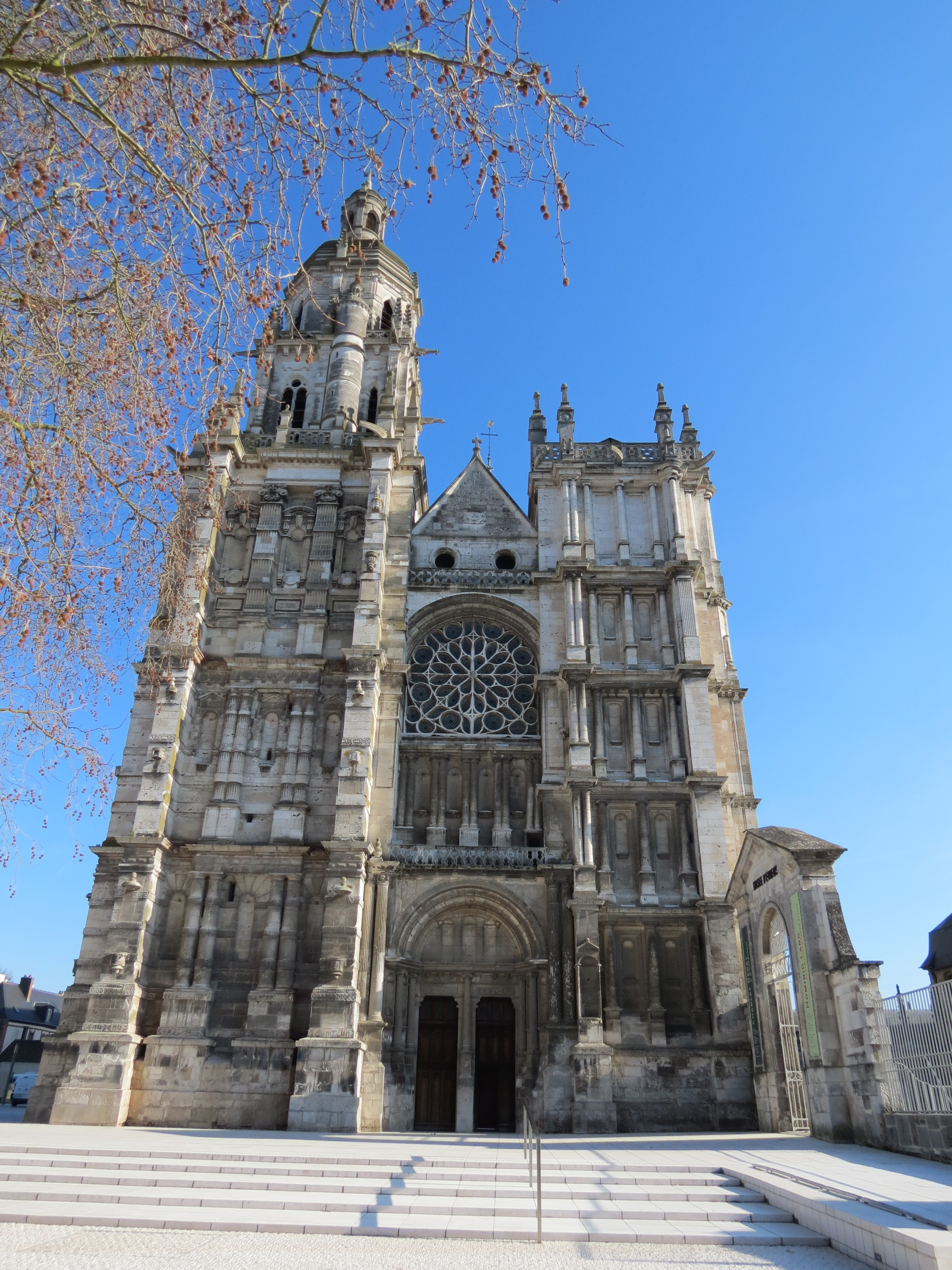 Façade occidentale de la cathédrale d'Évreux depuis son parvis.